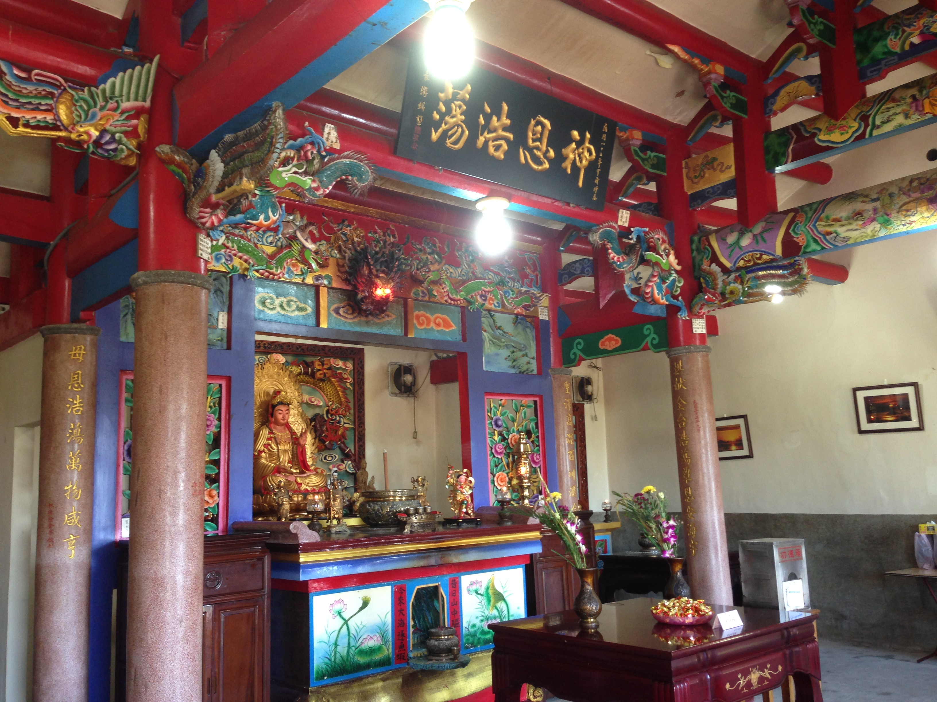 龜山島普陀巖廟內